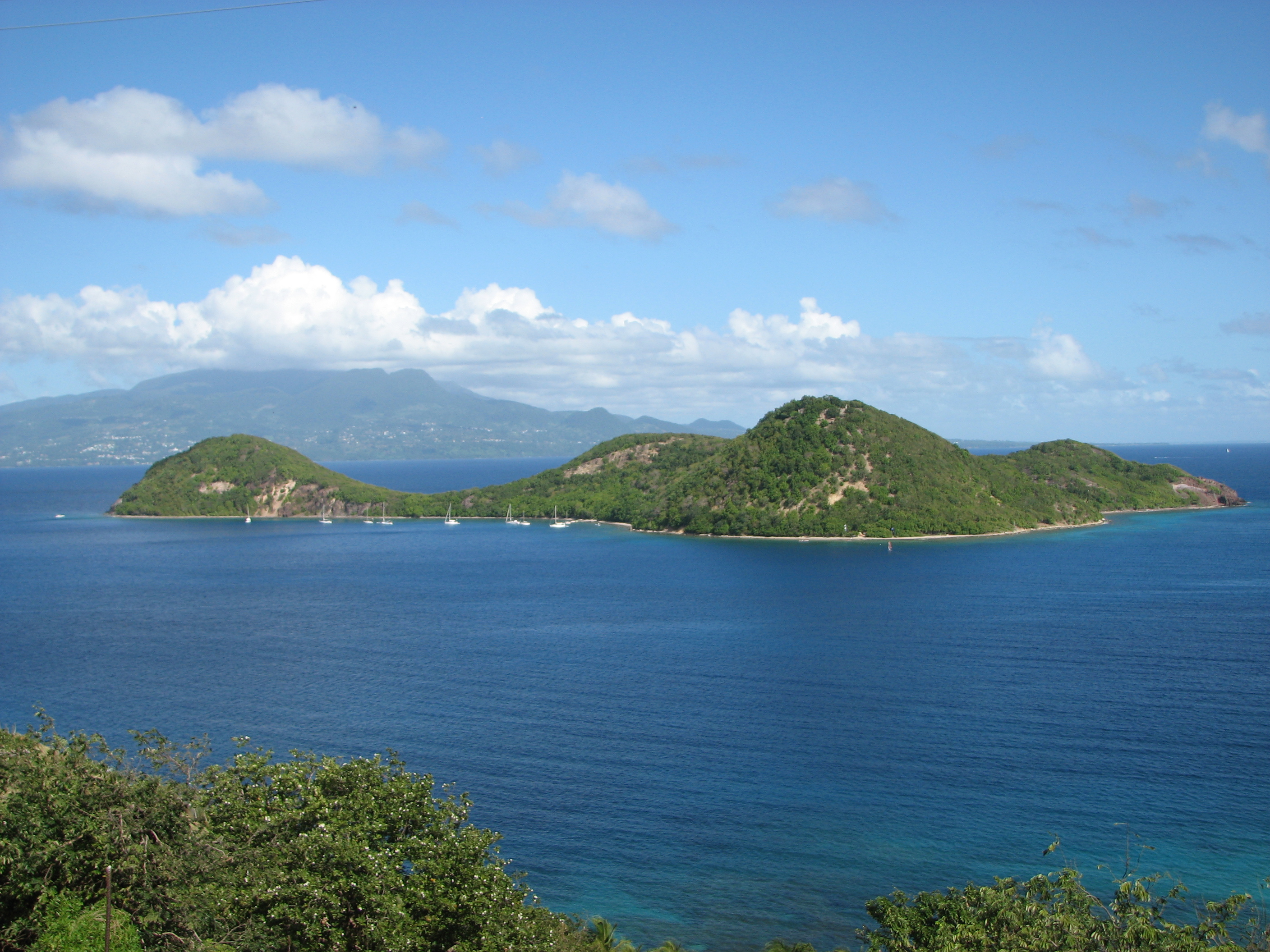 Îlet à Cabrit, dans l'archipel des Saintes. Vu de Terre-de-Haut, avec la Guadeloupe dans le fond.